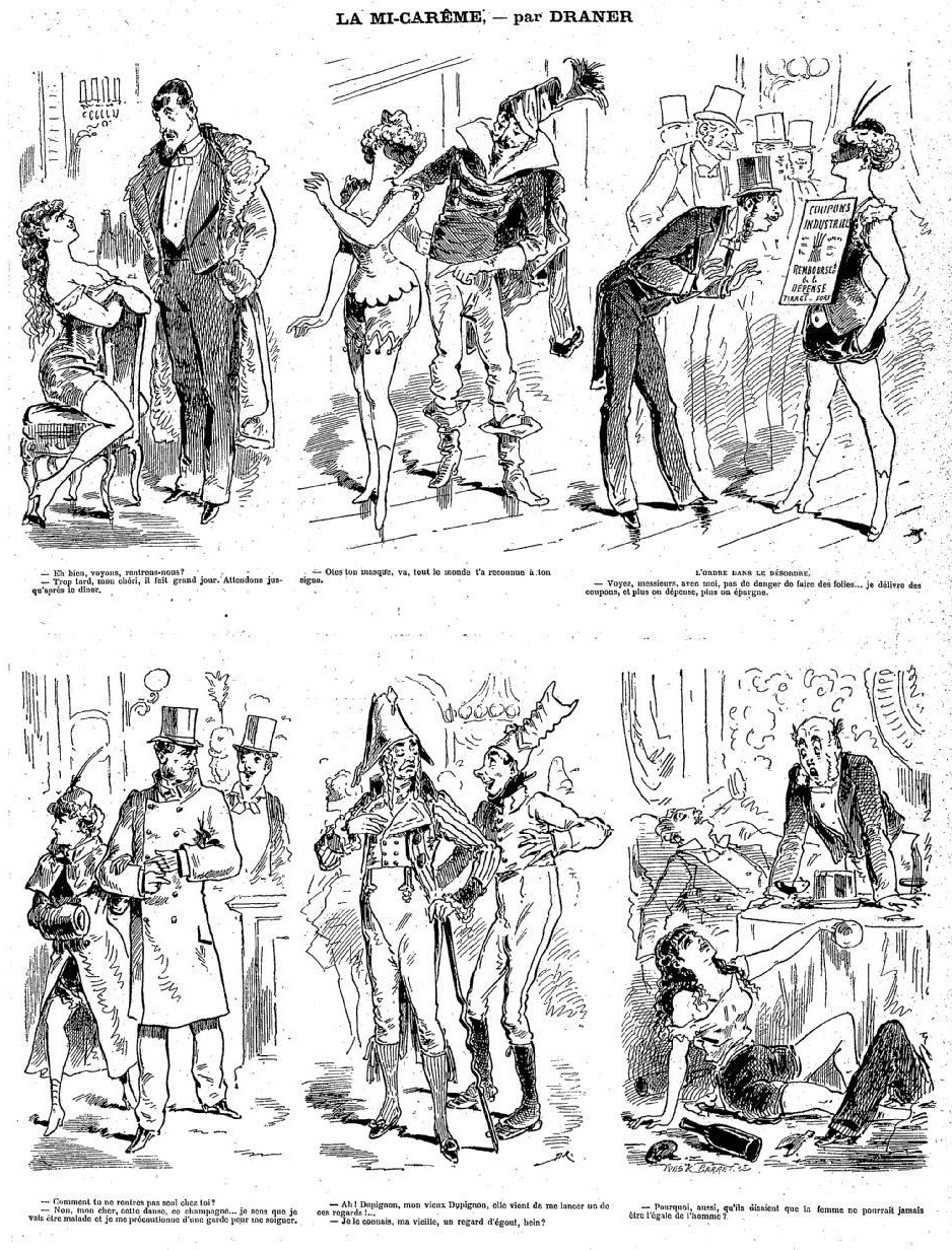 Planche de dessins comiques illustrant la Mi-Carême à Paris.